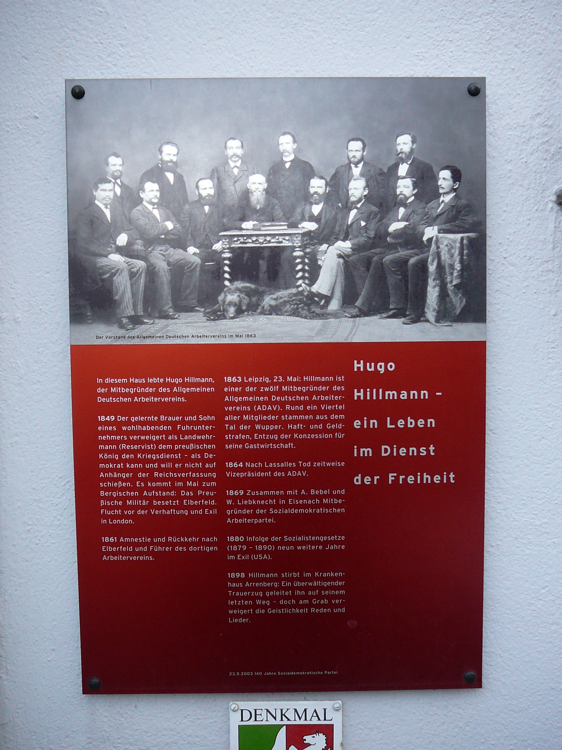 Untergrünewalder Straße 10This is a photograph of an architectural monument.